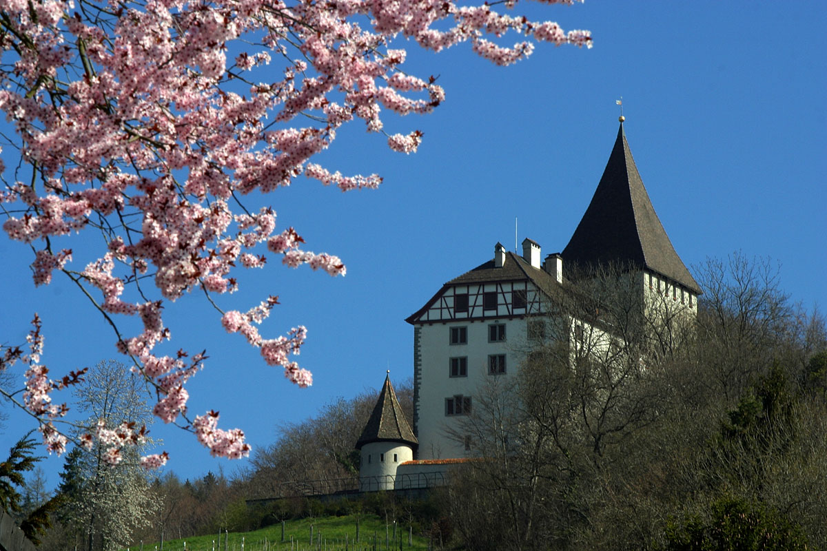 Schloss Weinfelden im Privatbesitz